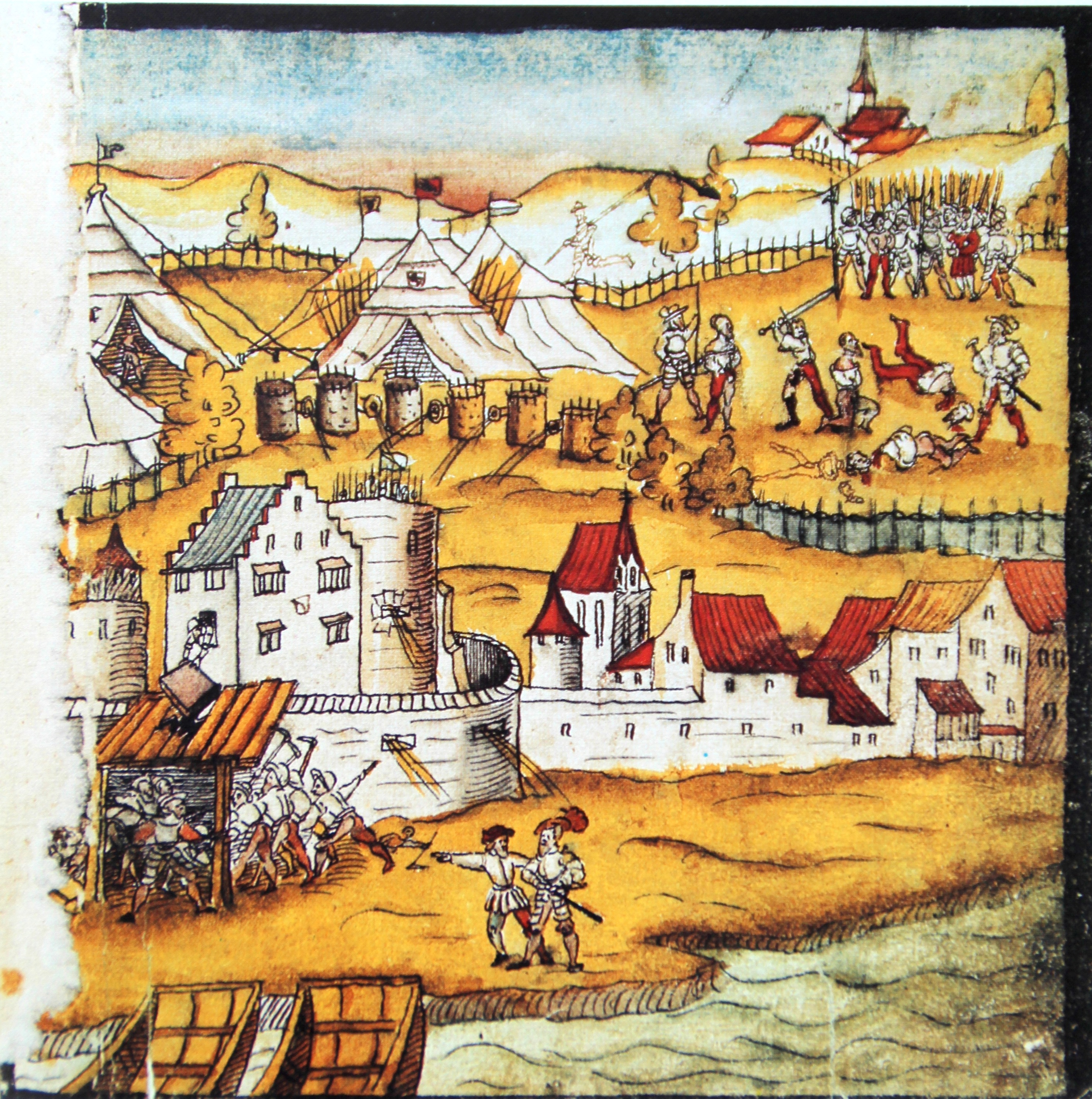 Wickiana Bluttat zu Greifensee ZH im alten Zürichkrieg 1444